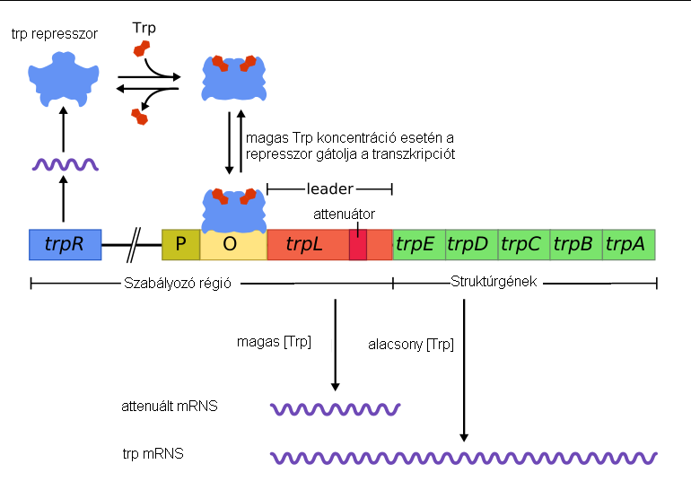 A triptofán operon szabályozása a represszor fehérje által.